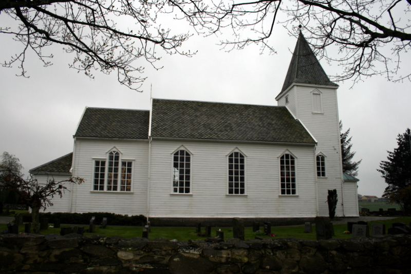 Bore kirke, Klepp, Rogaland